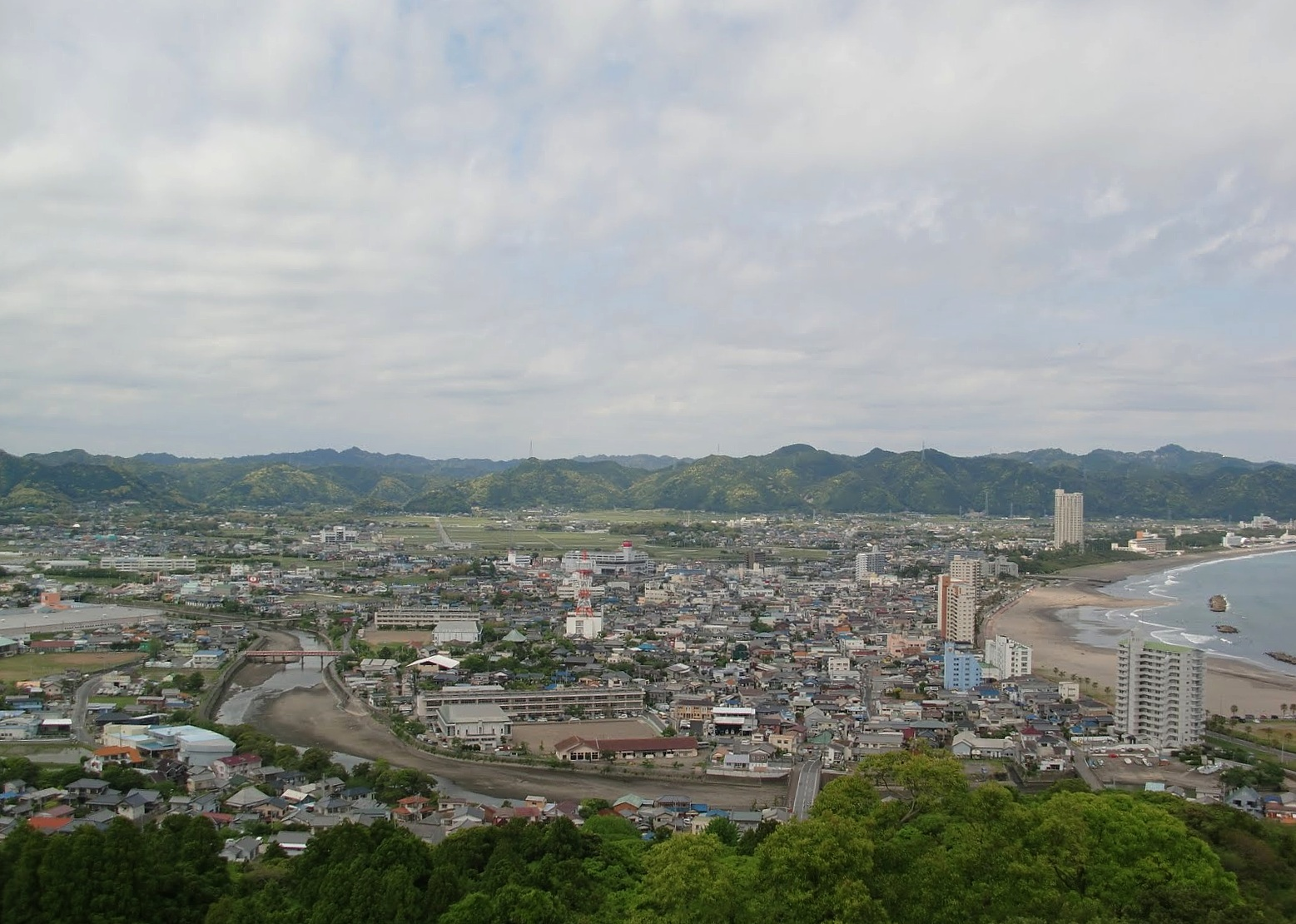 魚見塚展望台から鴨川市街を一望。昔は漁師がここから魚群を見ていたことから魚見塚、と呼ぶそうで。この展望台はまさに360度を見渡すことができ、海・山・街を見ることができる。夕日や朝日、夜景などは絶景だとか・・・。